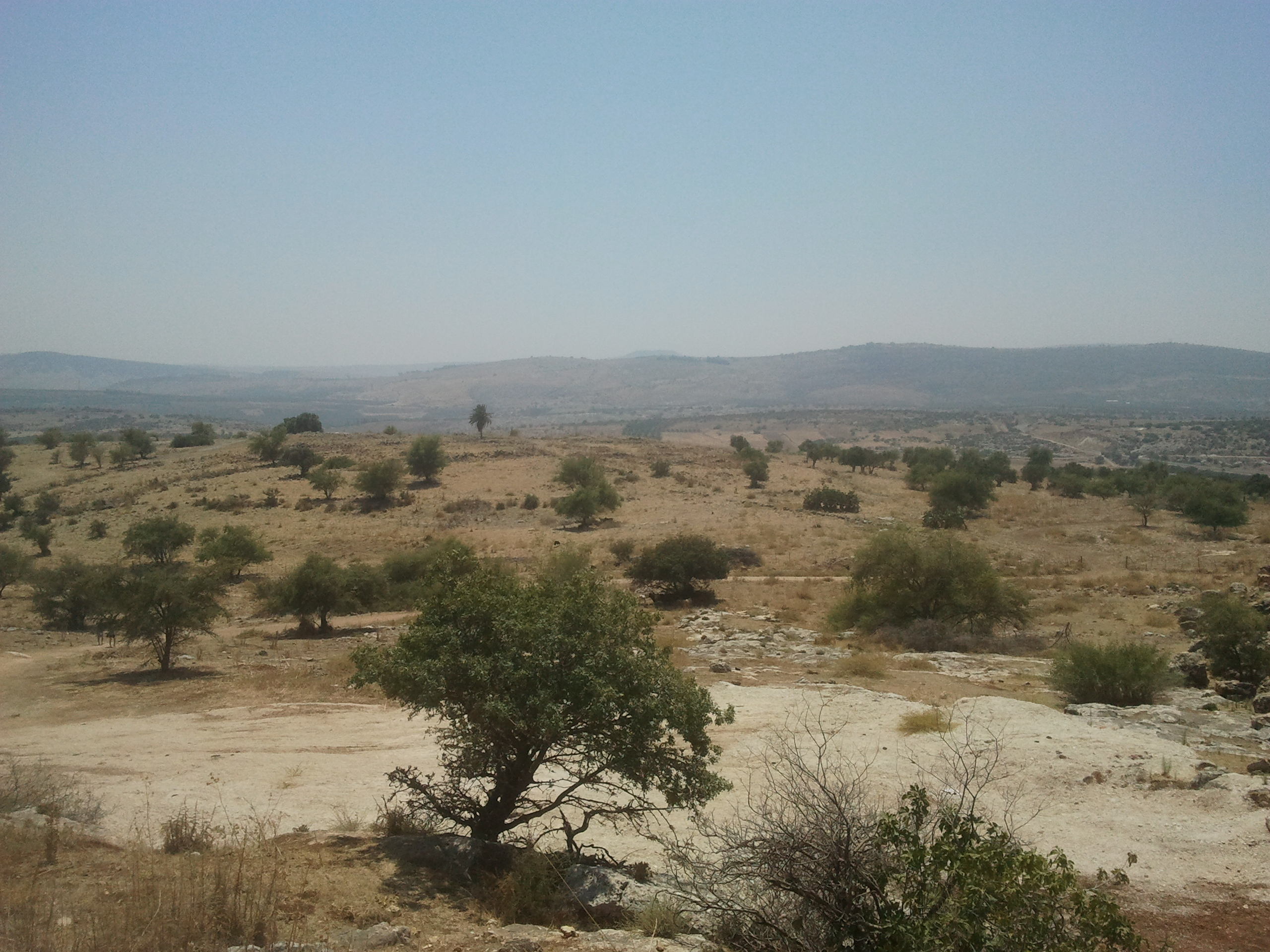 שרידי היישוב היהודי העתיק חוקוק שהיה כפר יהודי בימי המשנה והתלמוד. על שליש משטחו שכן לאחר מכן הכפר הערבי יאקוק